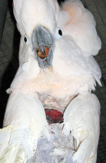 Grave stadio di autodeplumazione in Cacatua alba.